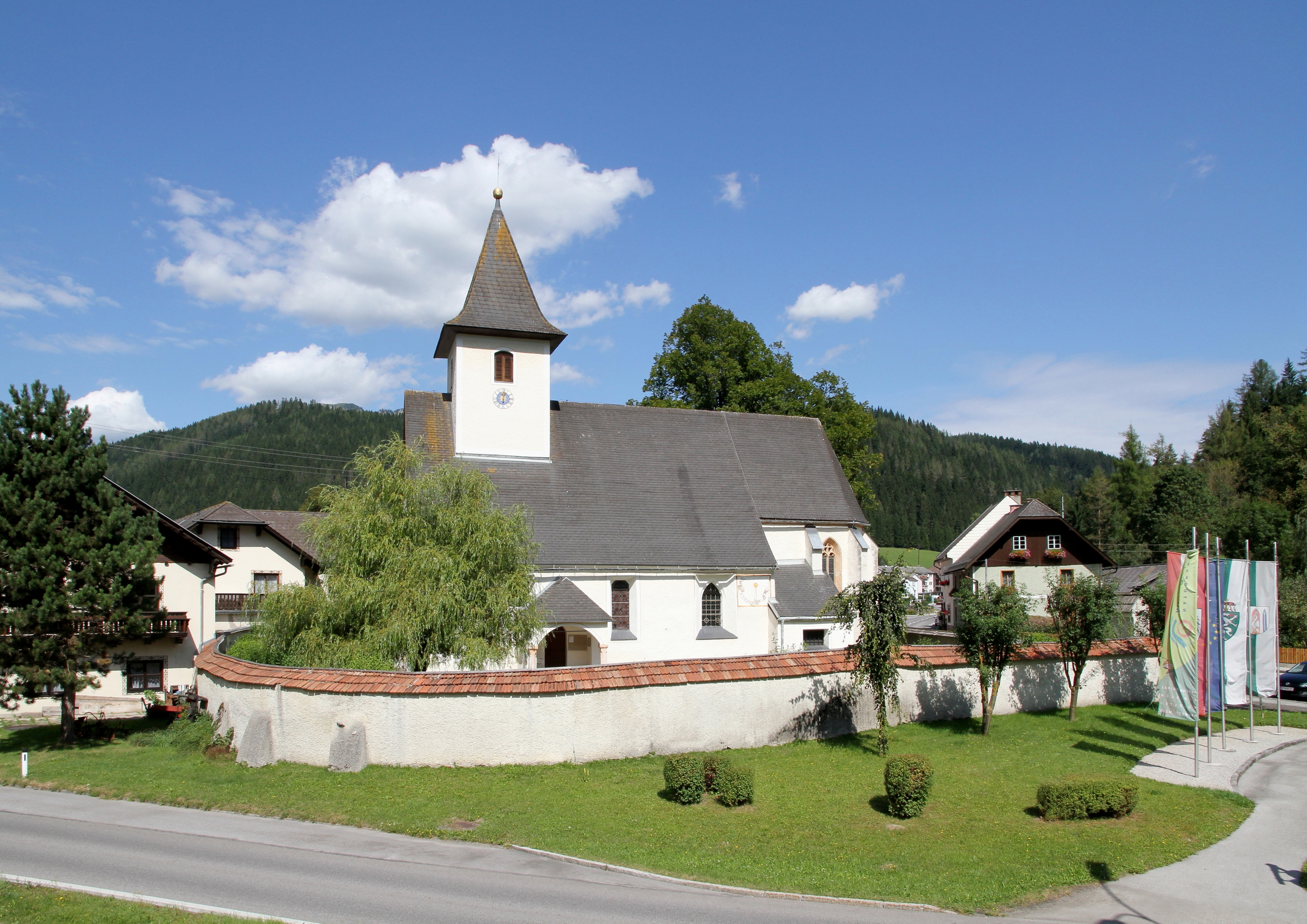 Katholische Pfarrkirche zur hl. Margaretha der steirischen Gemeinde Kapellen.